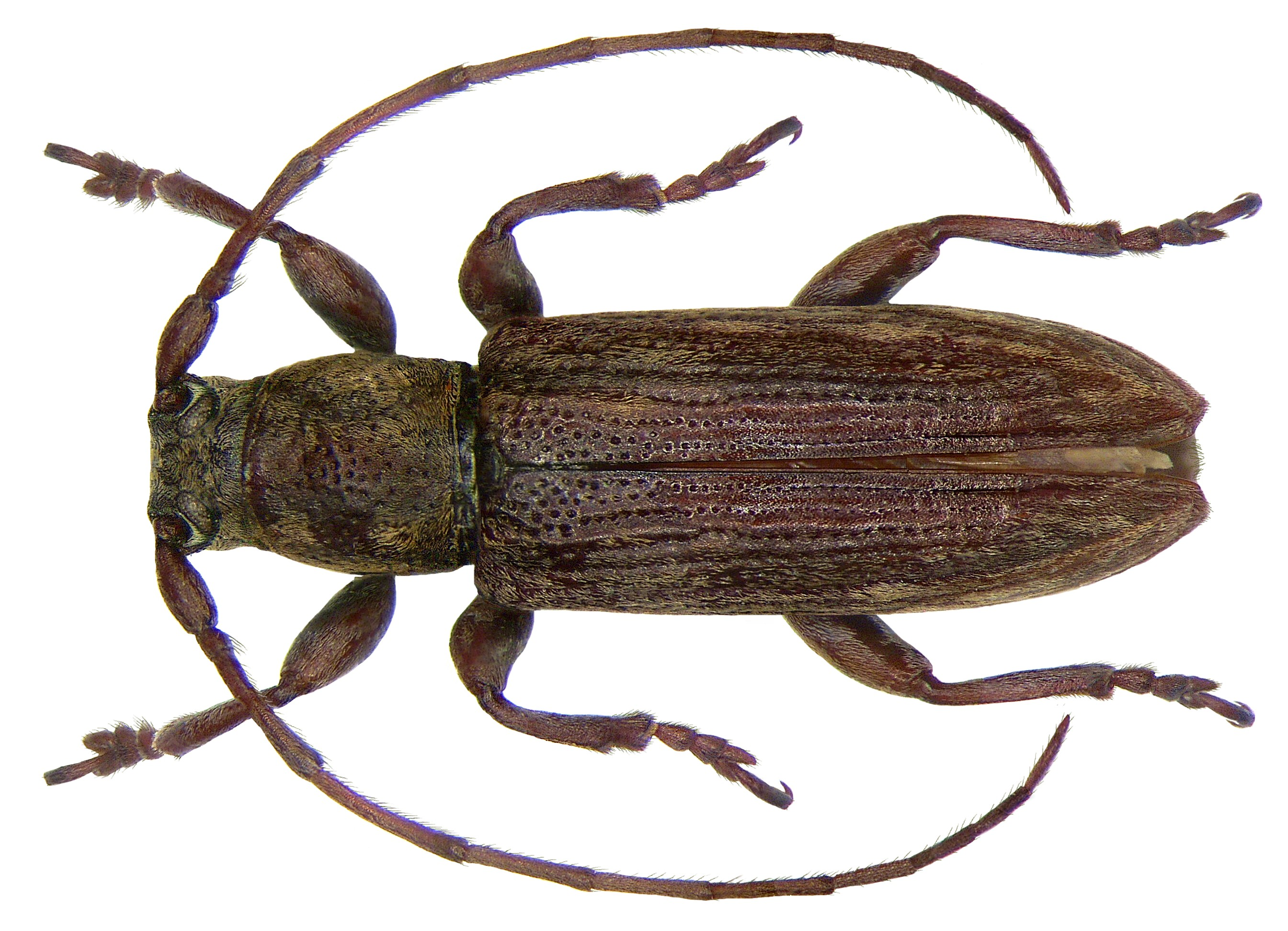 Familie: Cerambycidae Grösse: 7 mm Fundort: Indonesien, Sulawesi, Kandari leg. O.Beccari, 1914; det. Breuning, 1939 Holotypus, Coll. Museum Genua Foto: U.Schmidt, 2008